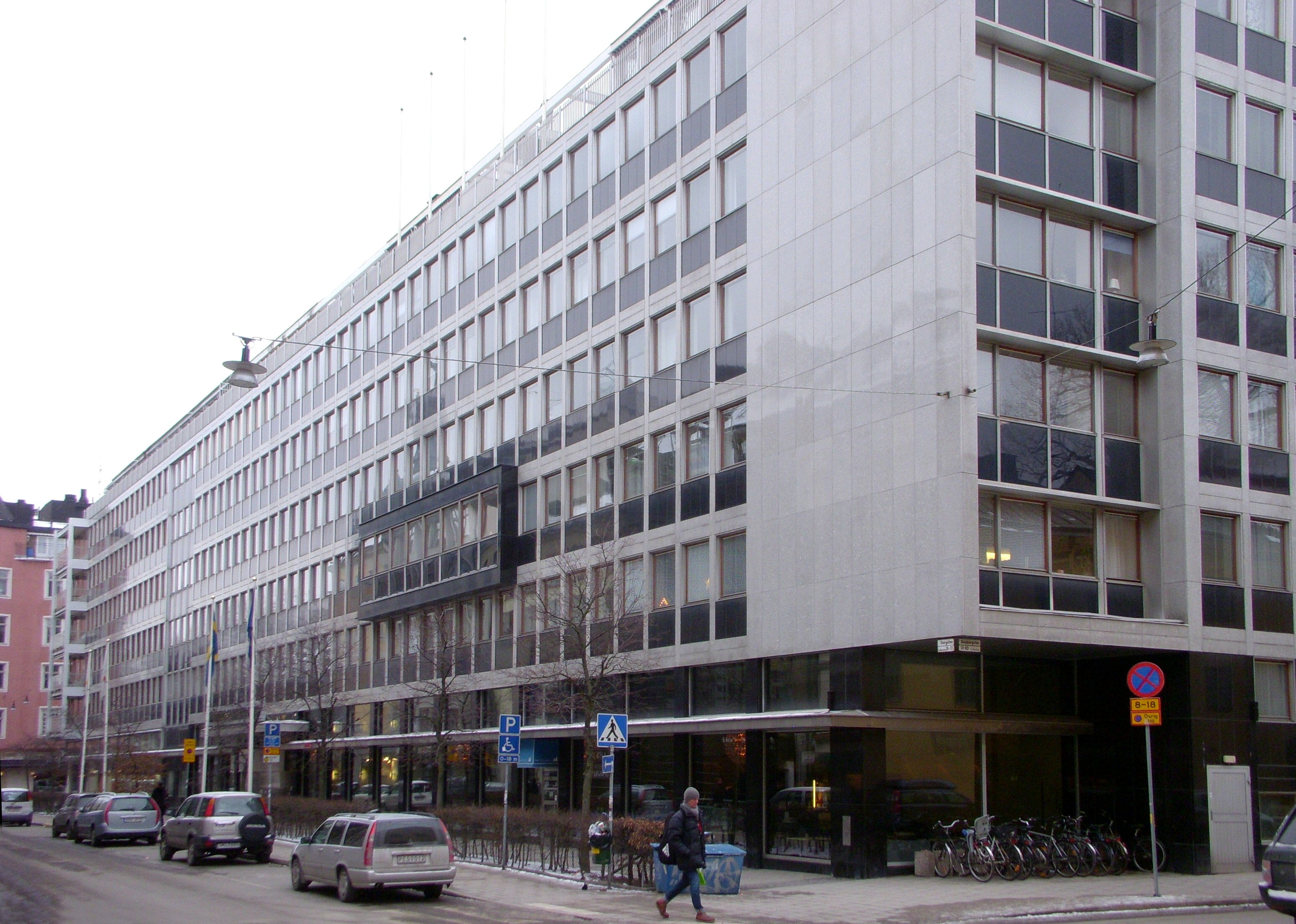 Näringslivets hus, hörnet Storgatan/Skeppargatan, Stockholm